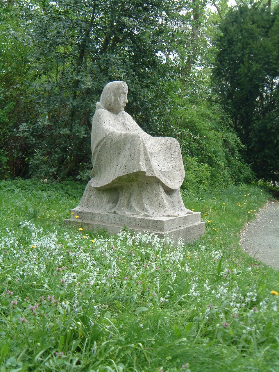 Barlachs "Mutter Erde" im Park der Gertrudenkapelle. Von mir (Axel Brocke) selbst fotografiert am 03.05.2003. - GNU Free Documentation License: Vorlage:Bild-GFDL